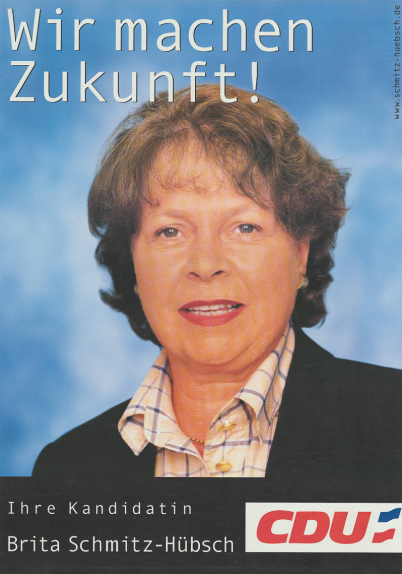 Wir machen Zukunft! Ihre Kandidatin Brita Schmitz-Hübsch CDUAbbildung:PorträtfotoPlakatart:Kandidaten-/Personenplakat mit PorträtObjekt-Signatur:10-012 : 1239Bestand:Landtagswahlplakate Schleswig-Holstein ( 10-012)GliederungBestand10-18:Landtagswahlplakate Schleswig-Holstein (10-012) » CDULizenz:KAS/ACDP 10-012 : 1239 CC-BY-SA 3.0 DE